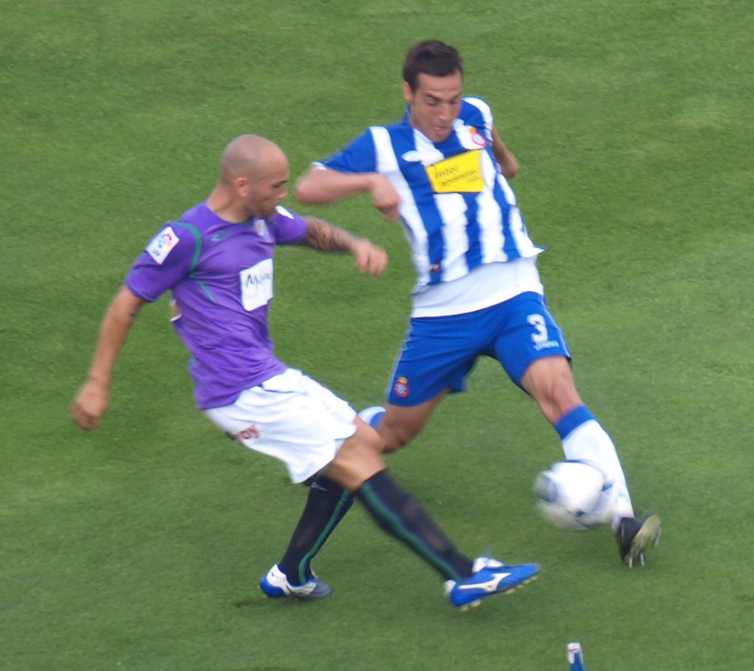 David García en el partido que enfrentó al RCD Español y al Málaga CF en el último partido de La Liga 2008/09 en el estadio Olímpico de Montjuic.